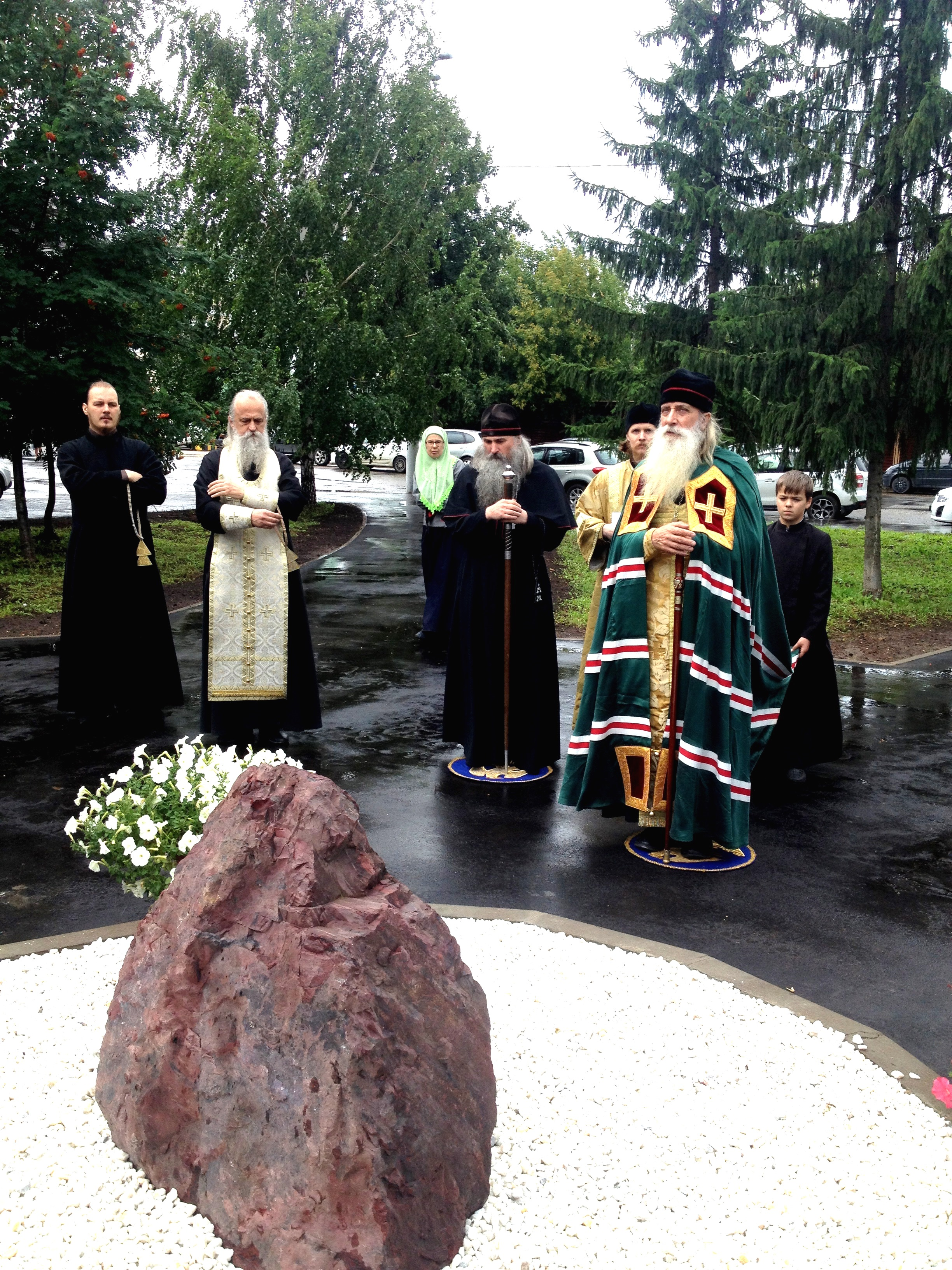 Предстоятель РПСЦ, митрополит Московский и всея Руси Корнилий (К.И.Титов) и епископ Казанский и Вятский Евфимий (Е.Е.Дубинов) на церемонии освящения и открытия закладного камня на месте будущего памятника митрополиту Московскому и всея Руси Андриану (А.Г.Четвергову) в сквере перед Покровским кафедральным собором Казанско-Вятской епархии РПСЦ в Казани (22 июля 2015 года).